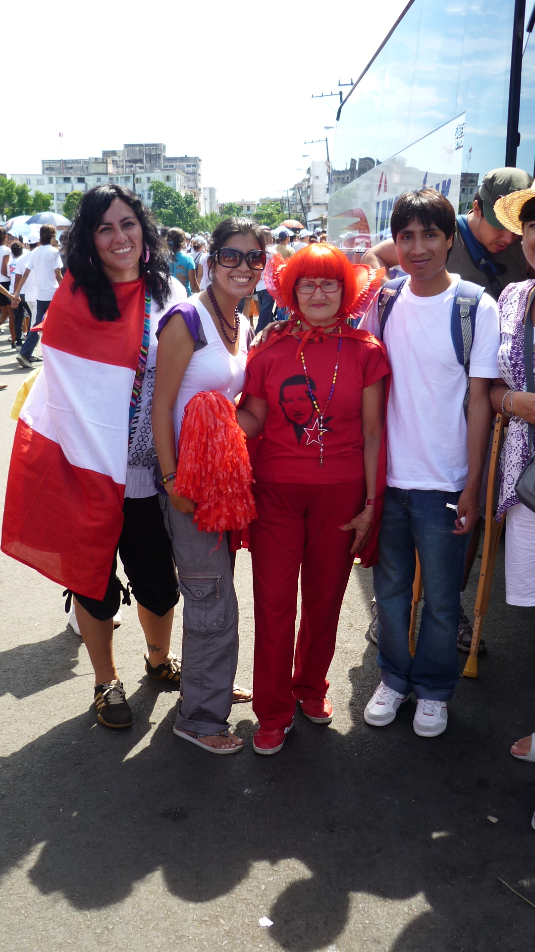 Unidos por la Paz, Perú, y una abuelita Venezolana.